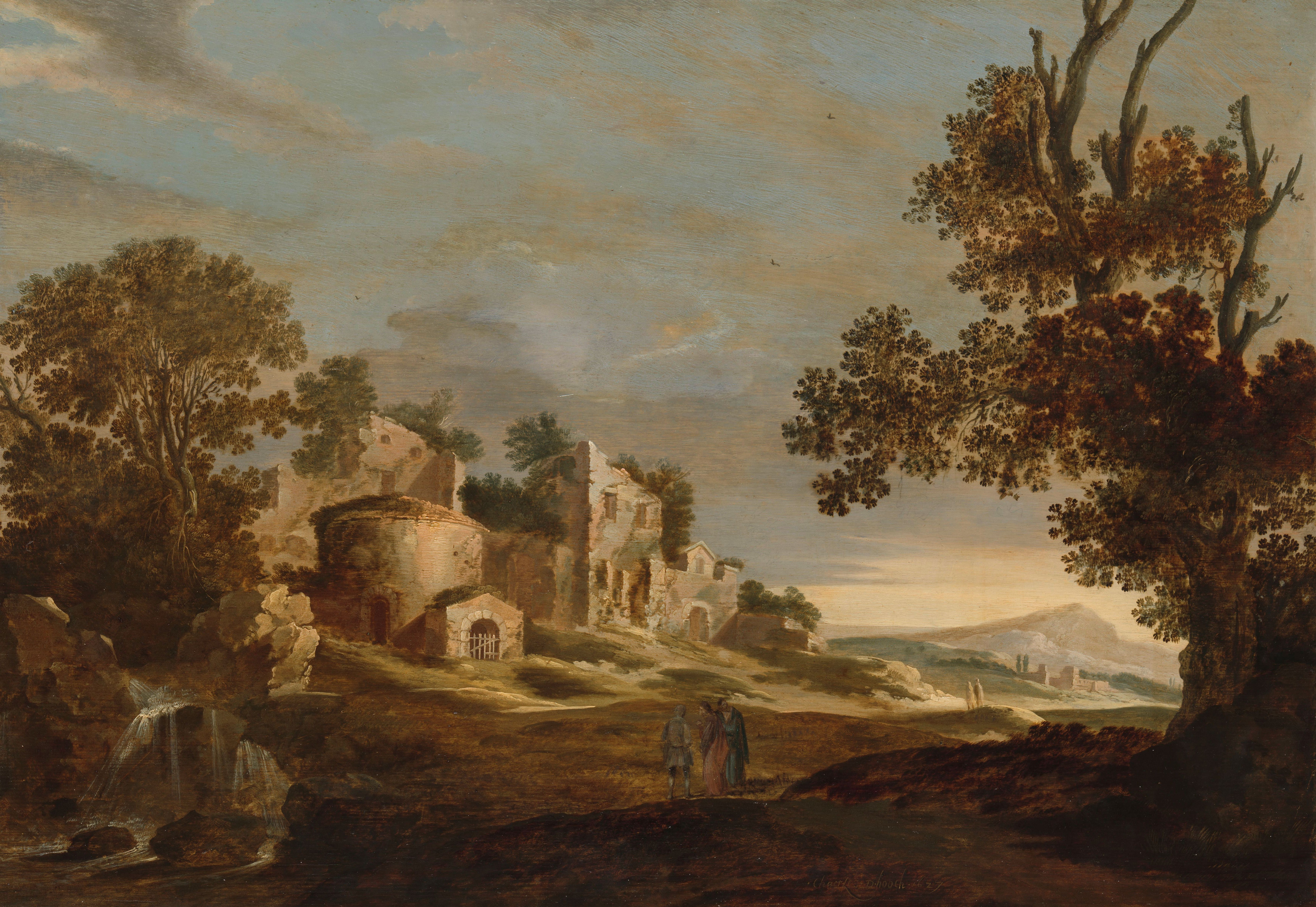 Landschap met de Emmaüsgangers. Heuvellandschap met links enkele vervallen gebouwen, op de voorgrond een watervalletje. Rechts een oude boom.